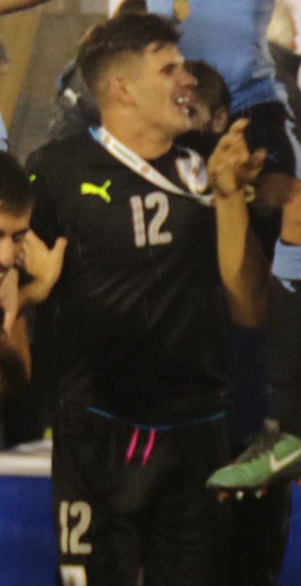 Quito 11 Feb (Andes).- Festejos y celebraciones por el triunfo del campeonato sudamericano de fútbol sub 20. La celeste uruguaya festejó la victoria del campeonato con gran emotividad. Fotografías: Carlos Rodríguez/Andes.